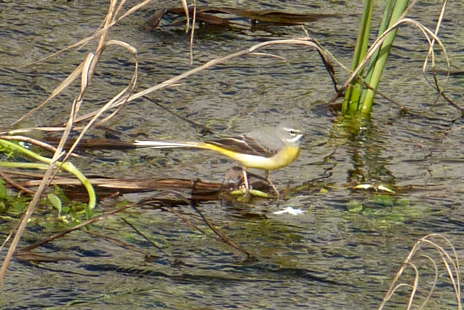 Aljezur - grey wagtail